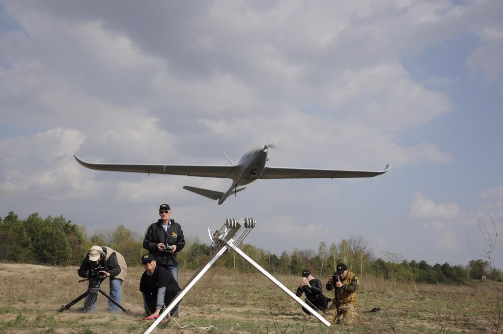 Вліт1